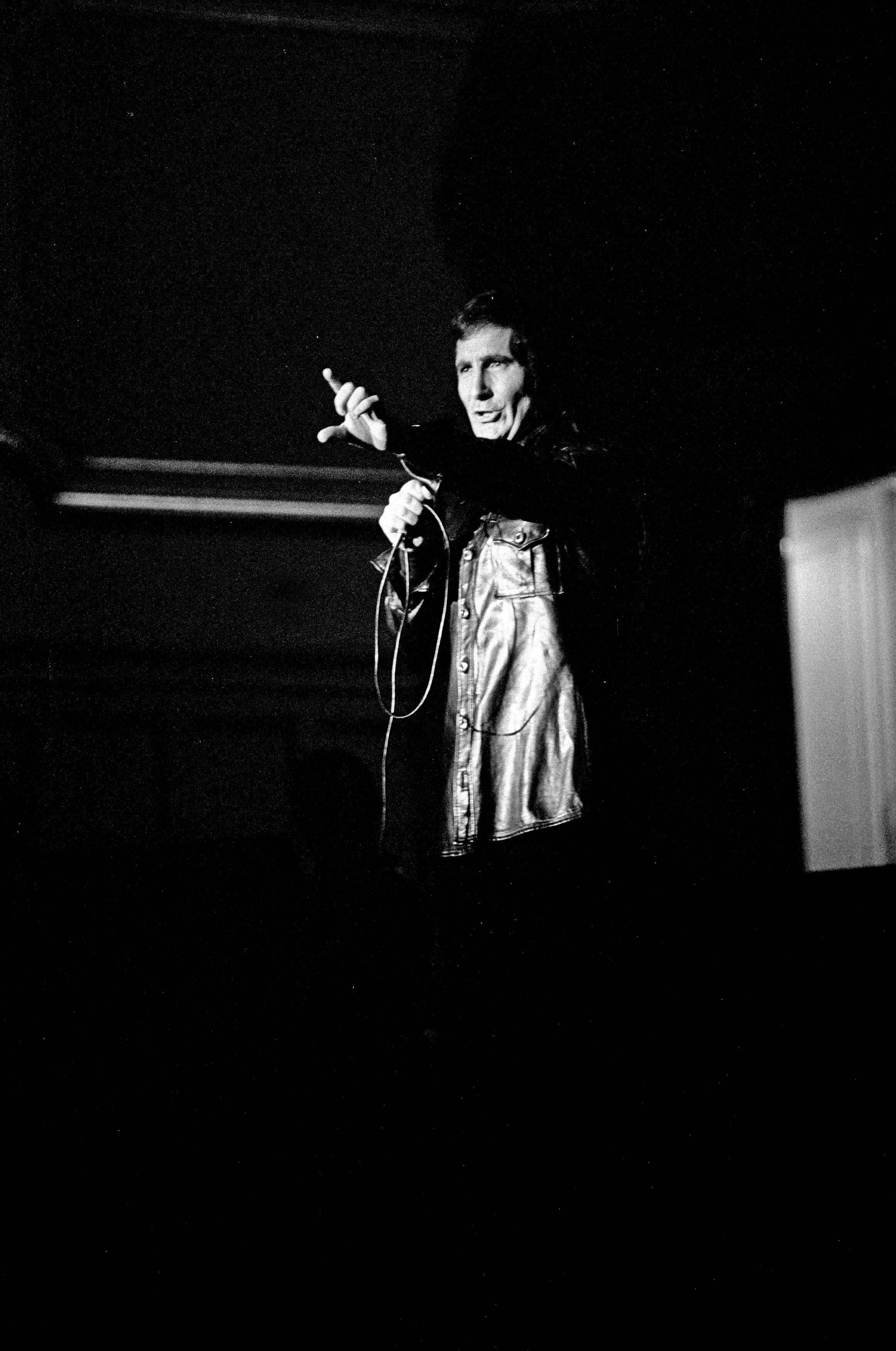 Schlagerstar Freddy Quinn in der Musikhalle Hamburg, 1971. Alter Mann? Er hat sich sogar aufs Hochseil getraut... Mehr Rock-Pop-Archiv auf